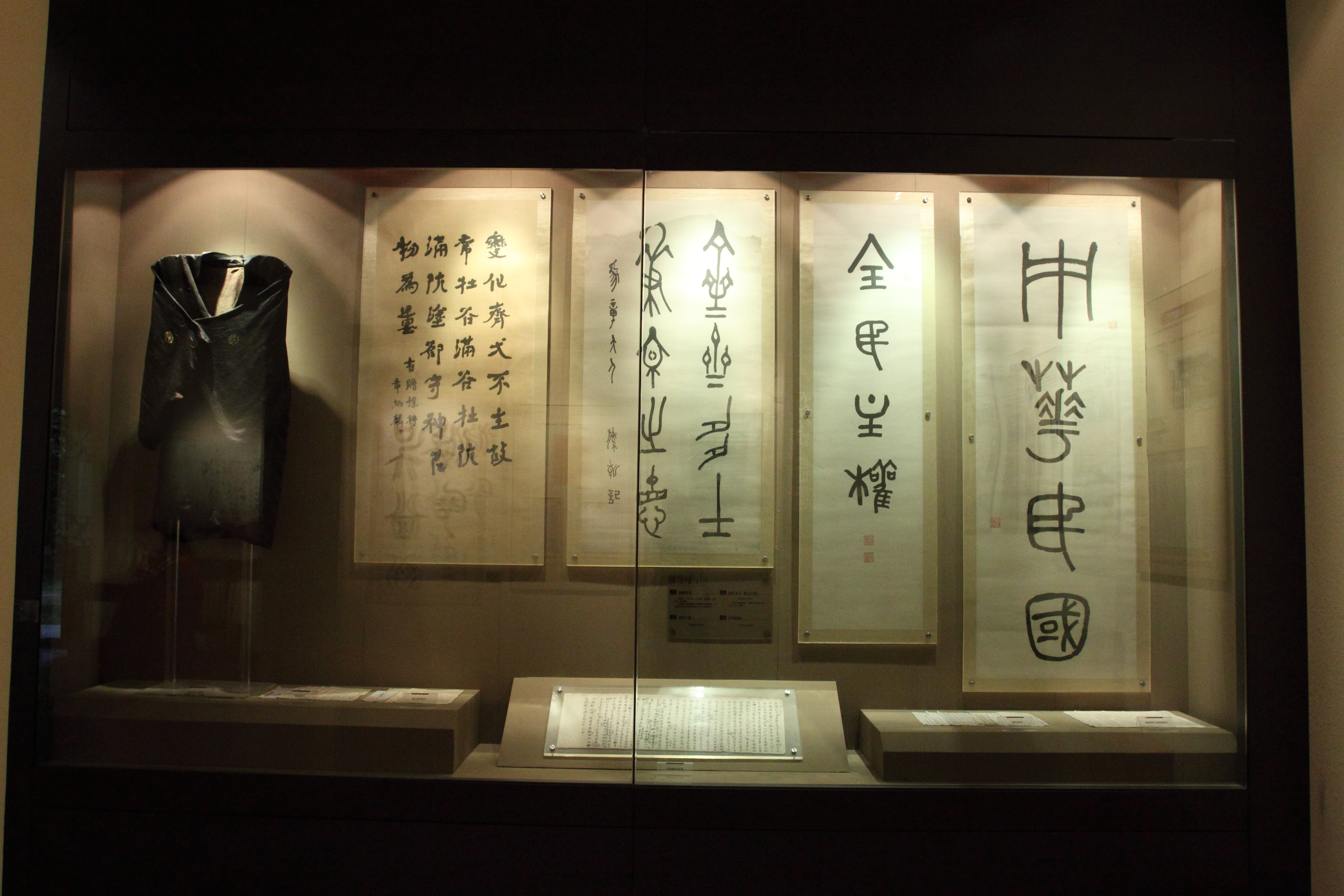 中国浙江杭州章太炎纪念馆收藏章太炎手迹。